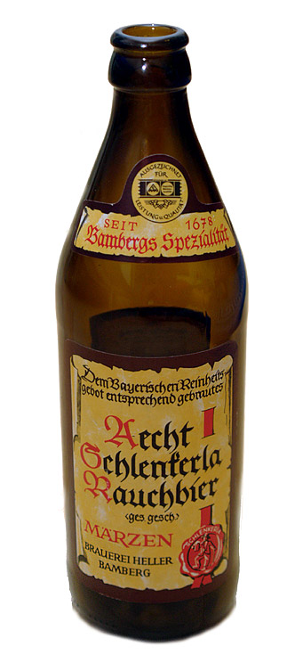 Aecht Schlenkerla Rauchbier Märzen from Germany.